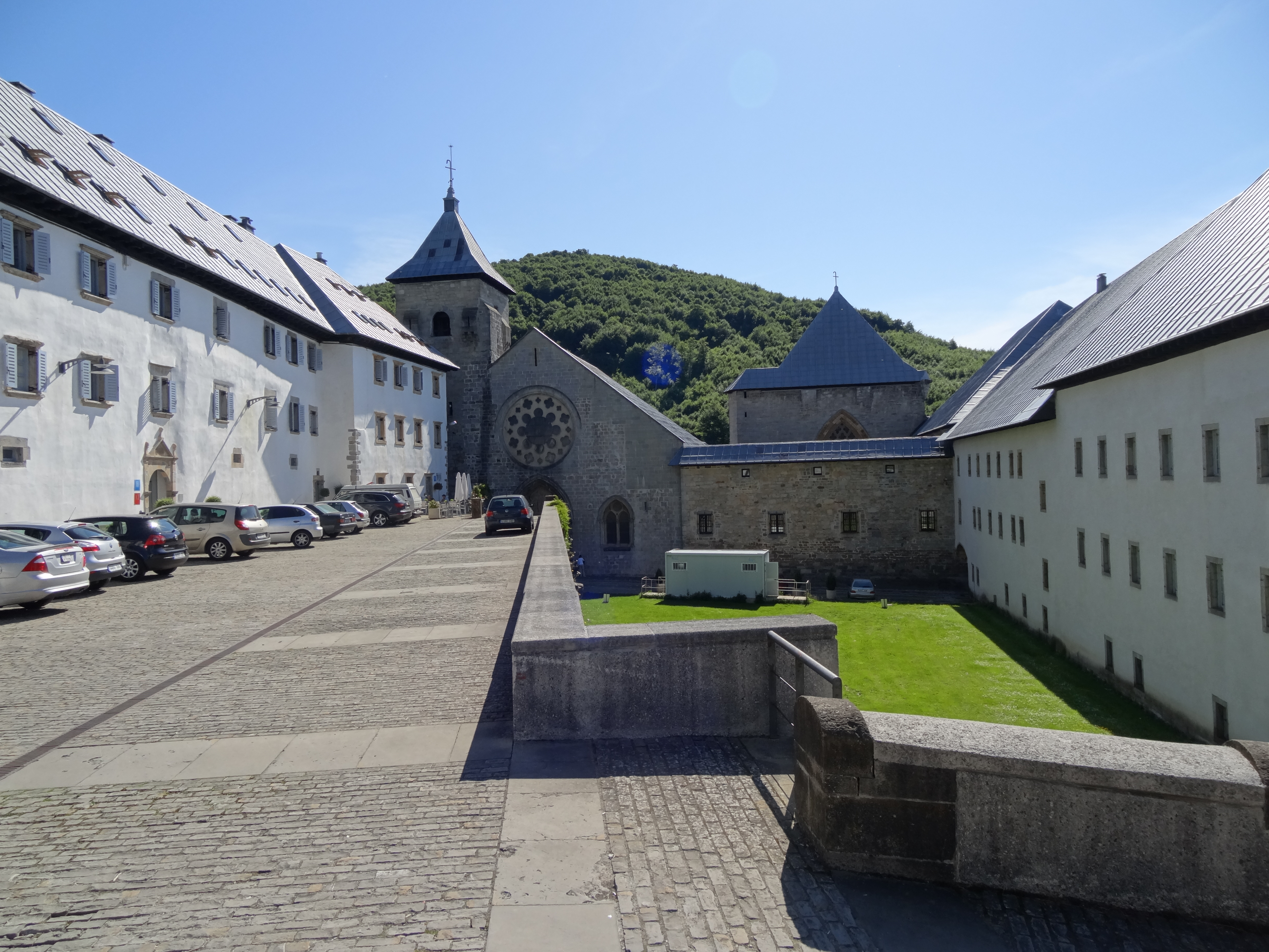 Iglesia colegiata de Santa María (Roncesvalles)